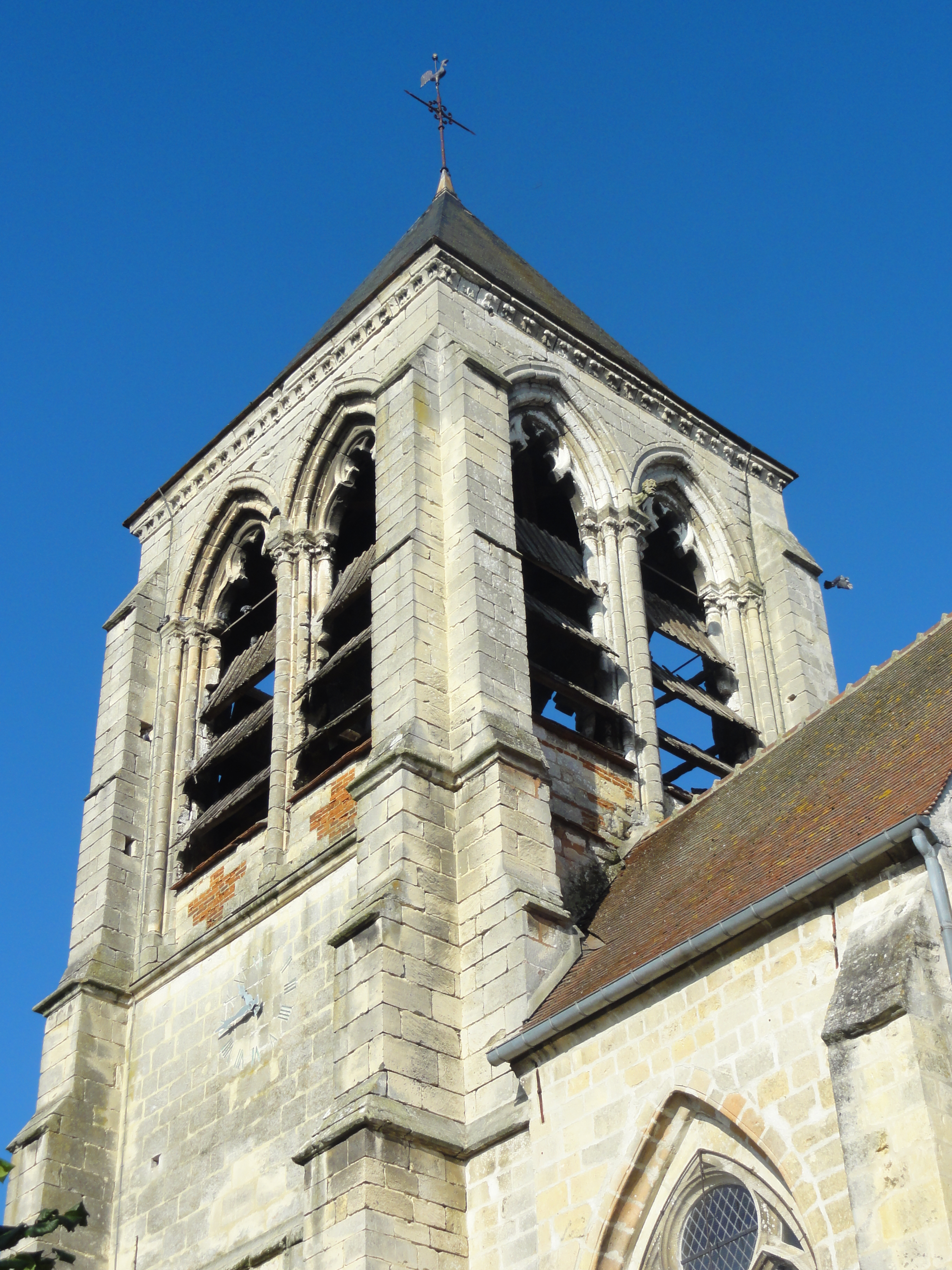 Clocher.